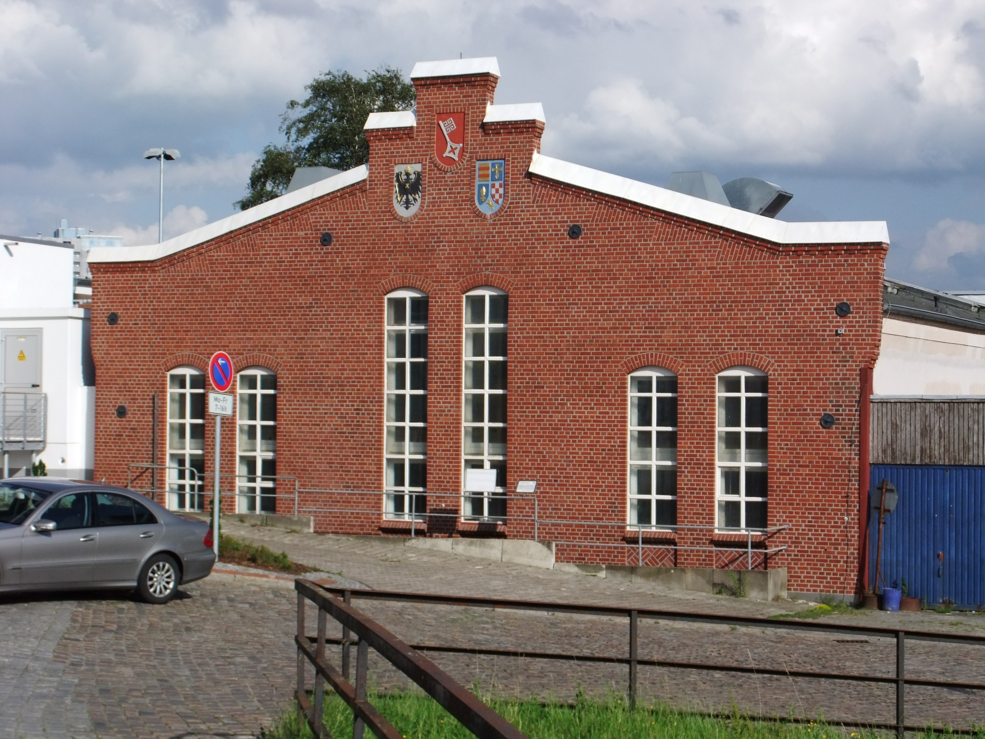 Tonnen- und Bakenamt zu Bremen, Wasser- und Schifffahrtsamt Bremerhaven in Bremerhaven, Am Alten Vorhafen 1. Das abgebildete Objekt ist ein geschütztes Kulturdenkmal in der Freien Hansestadt Bremen, mit der Nr. 1519 beim Landesamt für Denkmalpflege registriert.